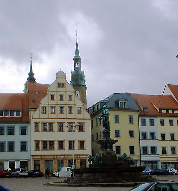 Freiberg Obermarkt mit Petrikirche